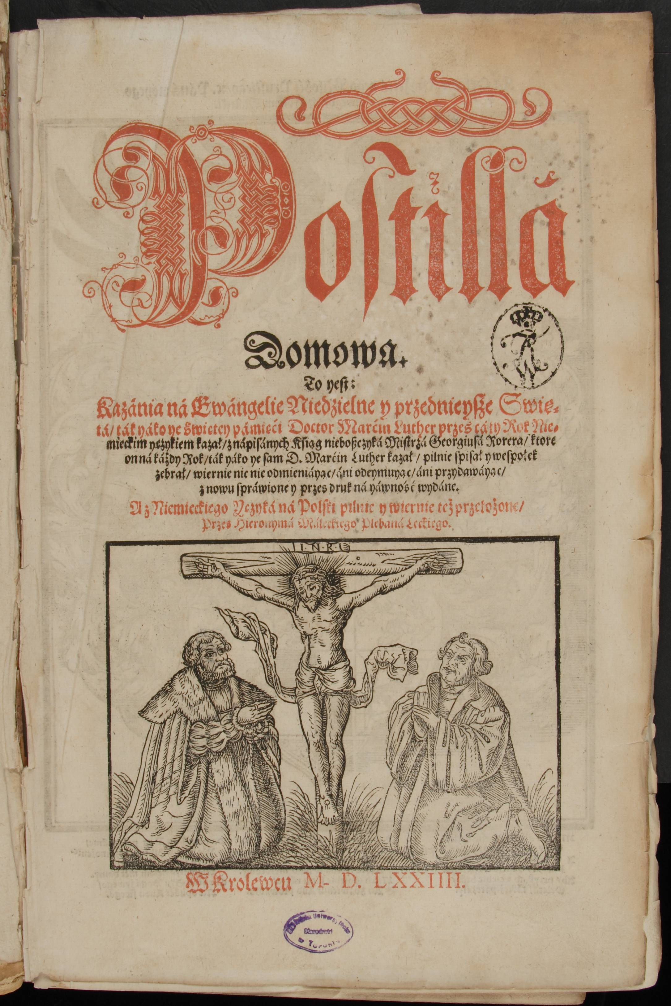 Karta tytułowa "Postylli domowej" tłumaczenia Hieronima Maleckiego z 1574 r. Biblioteka Uniwersytecka w Toruniu, Pol.6.III.79